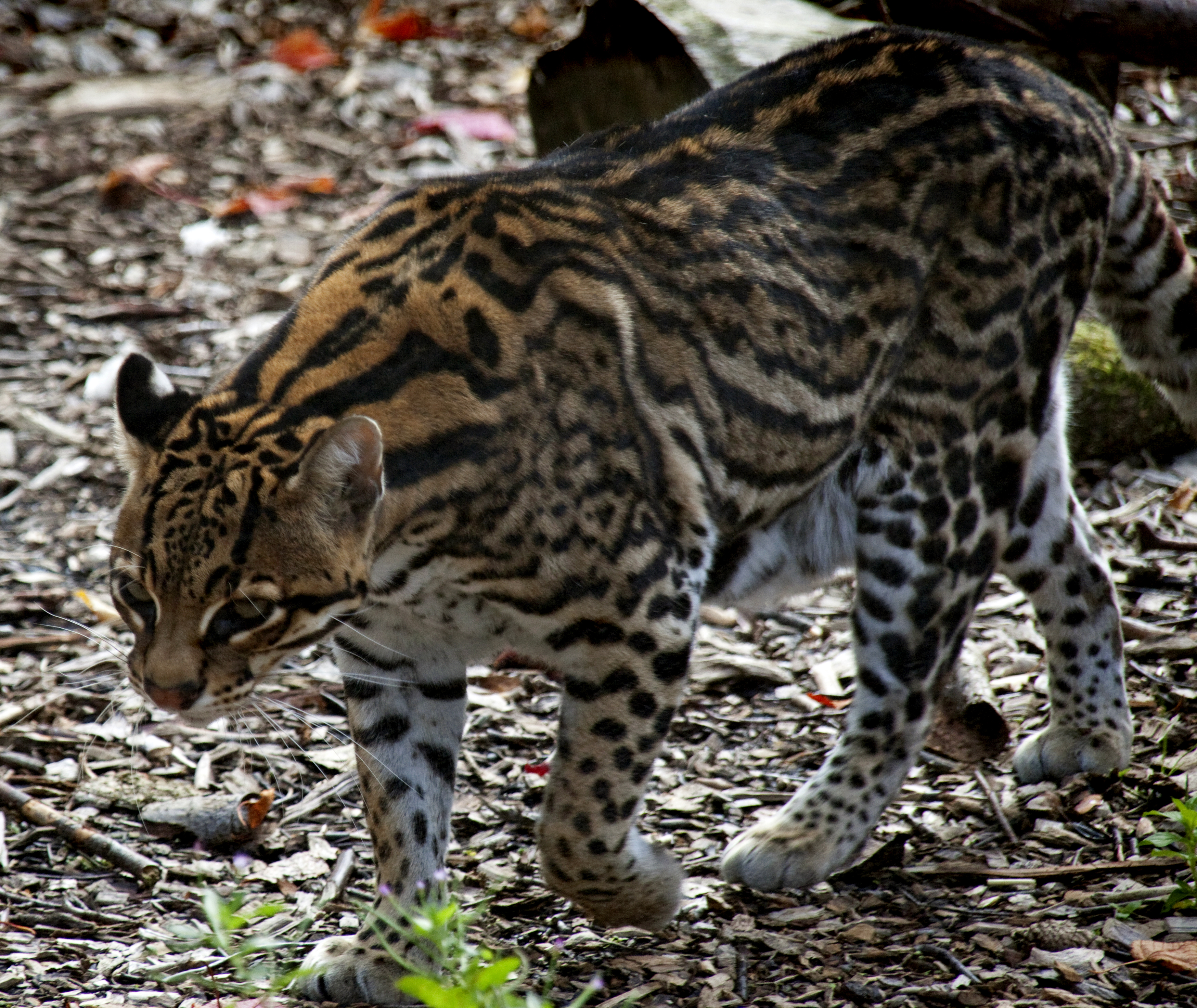 Ocelot (Leopardus pardalis)